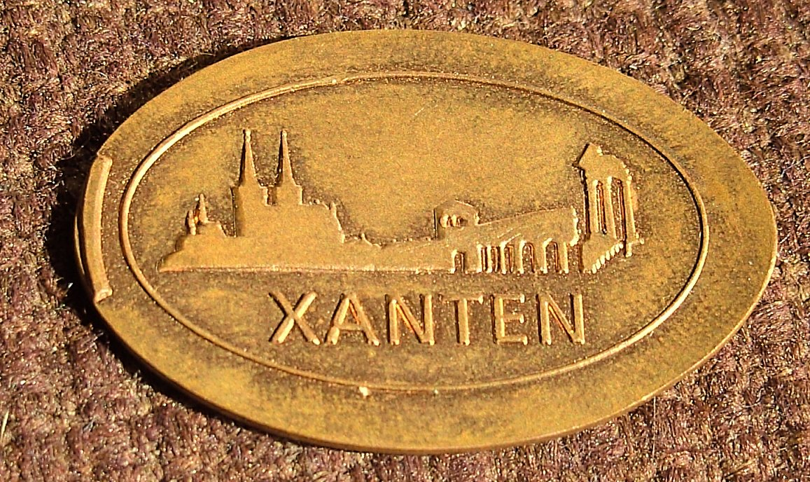 Eine Centmünze an einem Automaten geprägt, welche eine mit aus den Hauptsehenswürdigkeiten zusammengestellte Silhouette Xantens trägt.